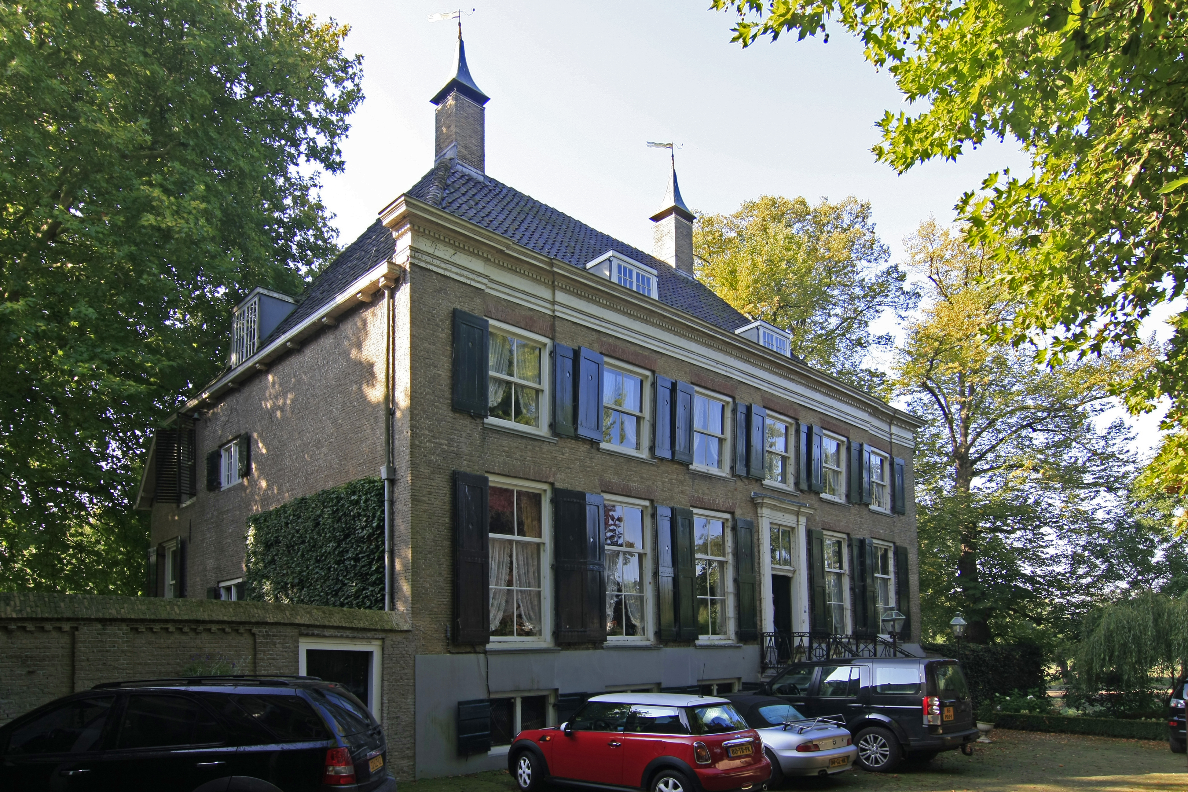 Kasteel Hof van Moerkerken